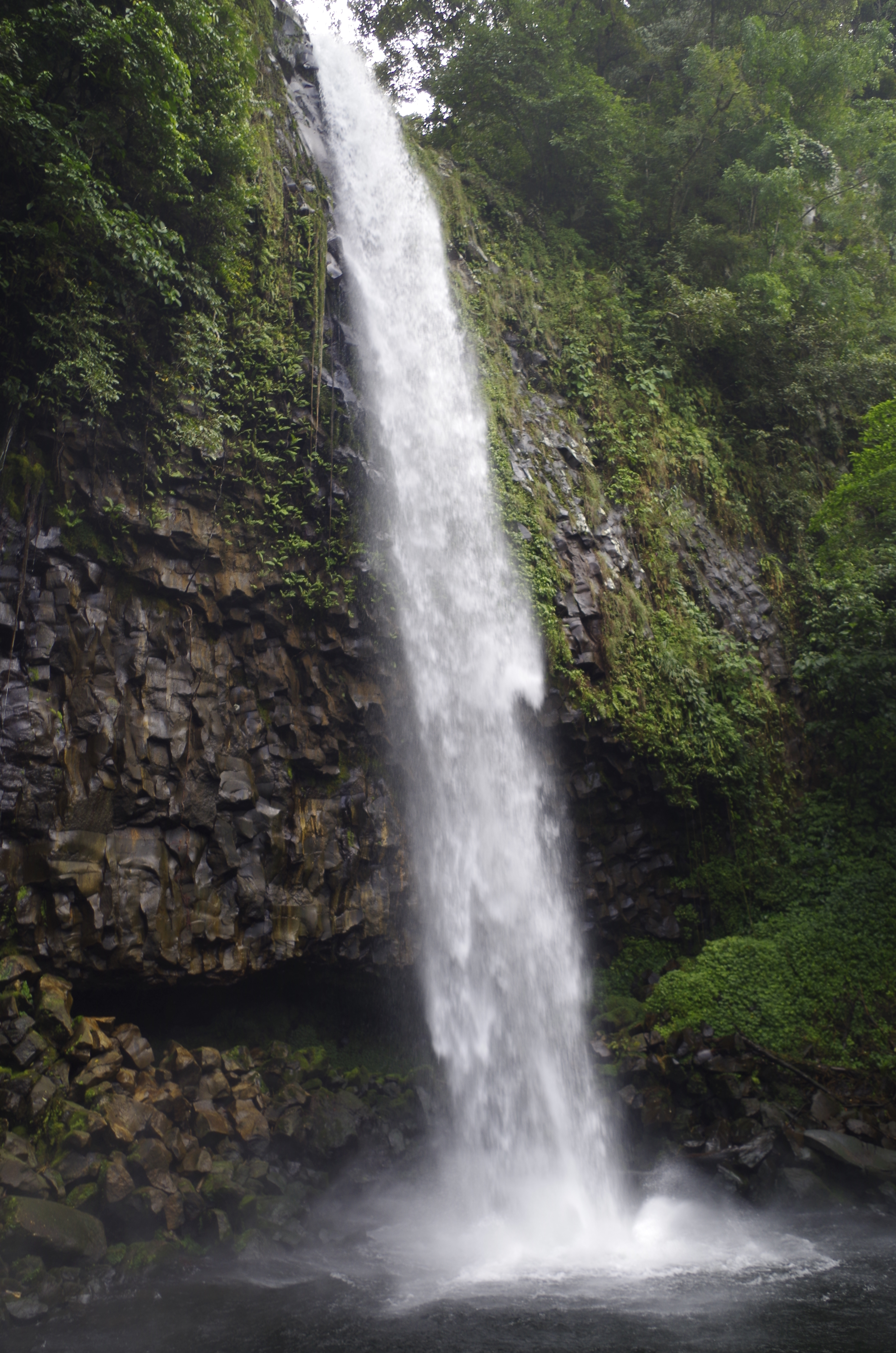 Air terjun ini ada di Sumatera Barat